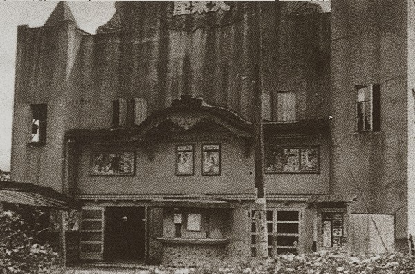 滋賀県草津市の文栄座、1954年の写真。